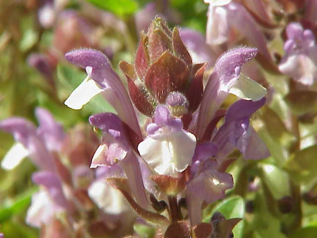 Species: Scutellaria alpina Family: Labiatae Image No. 2